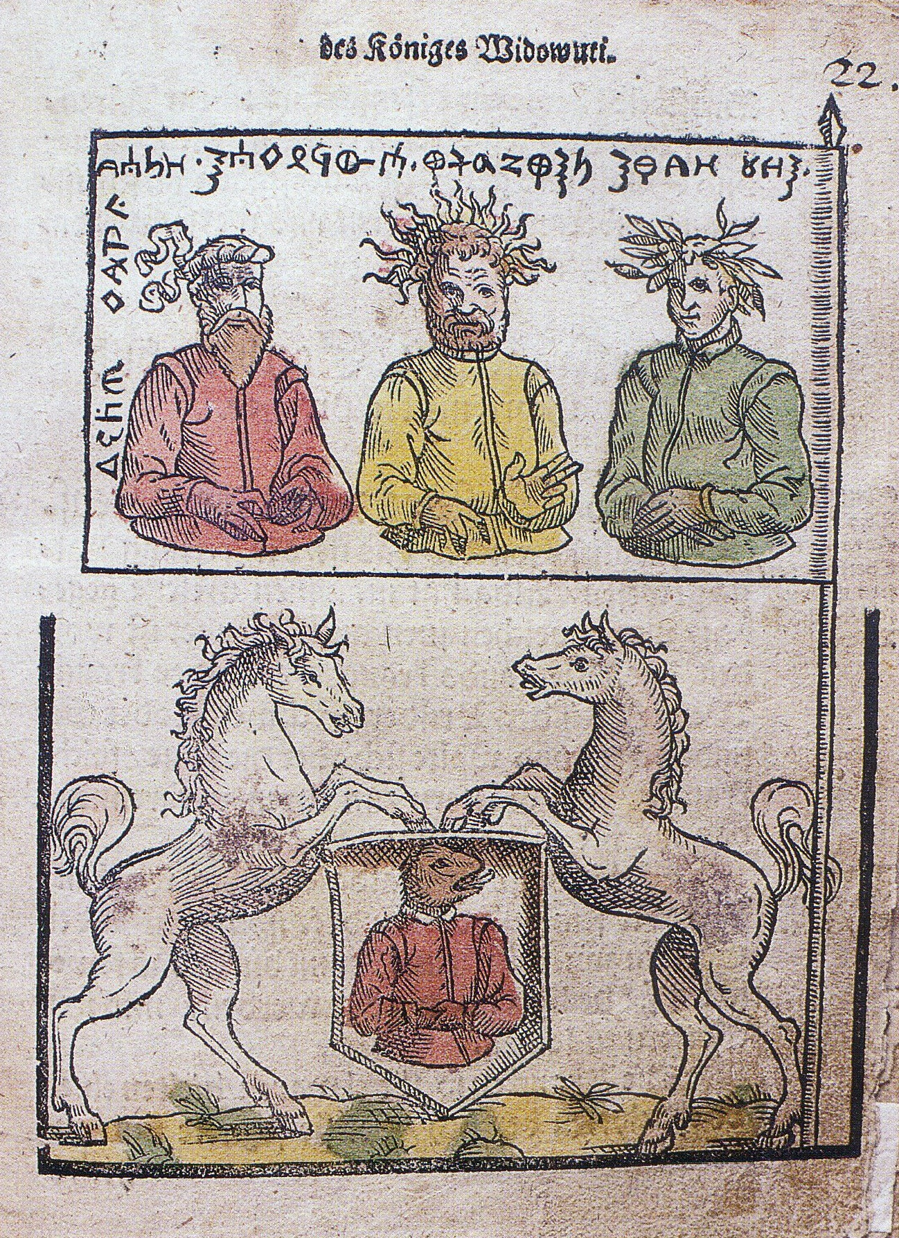 Kriegsbanner der Prußen mit Patollus, Percunus and Potrimpus und Wappen des Prußenkönigs Waidewuti